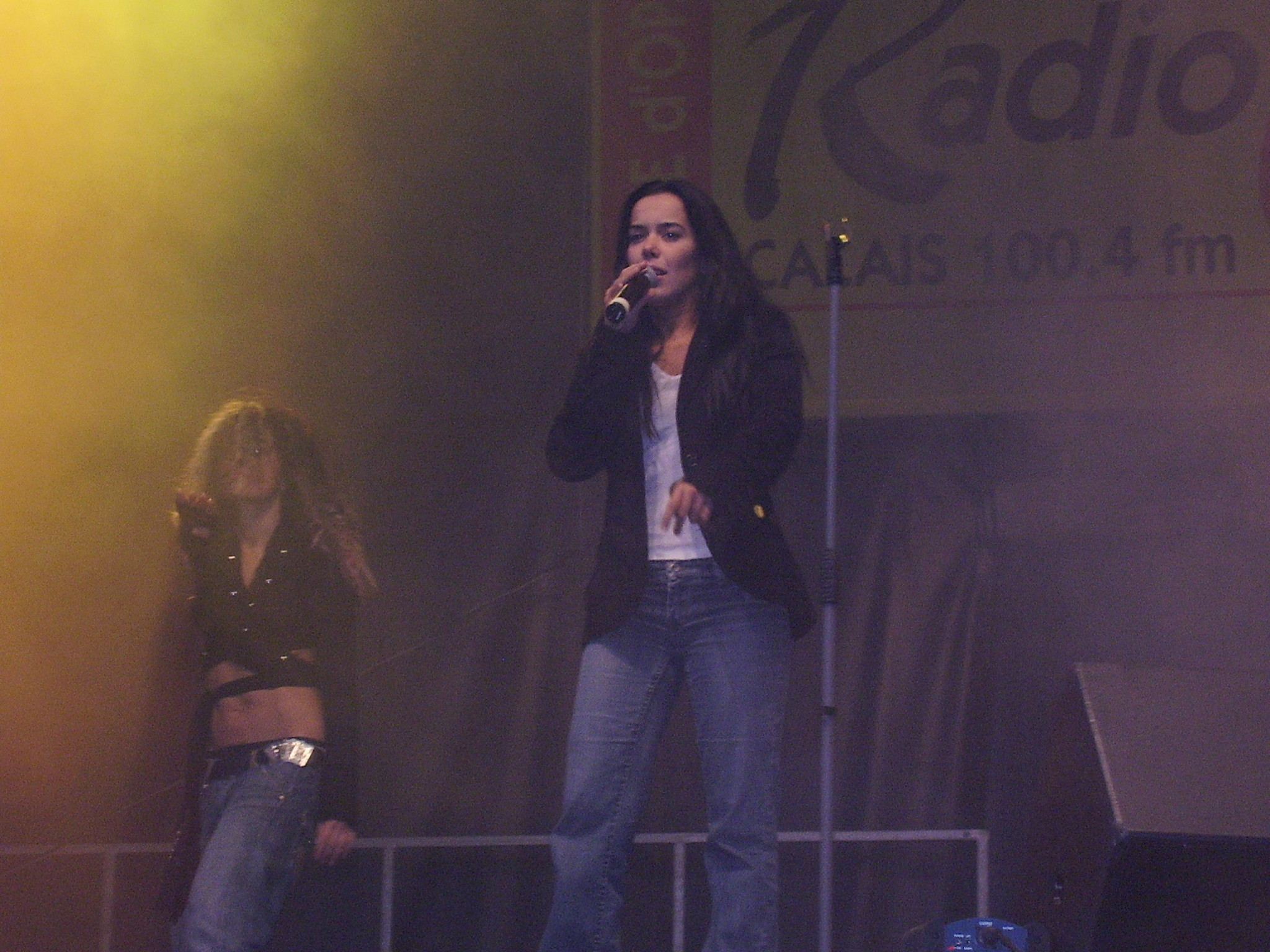 Beatriz Luengo au radio 6 Live de Calais en 2006